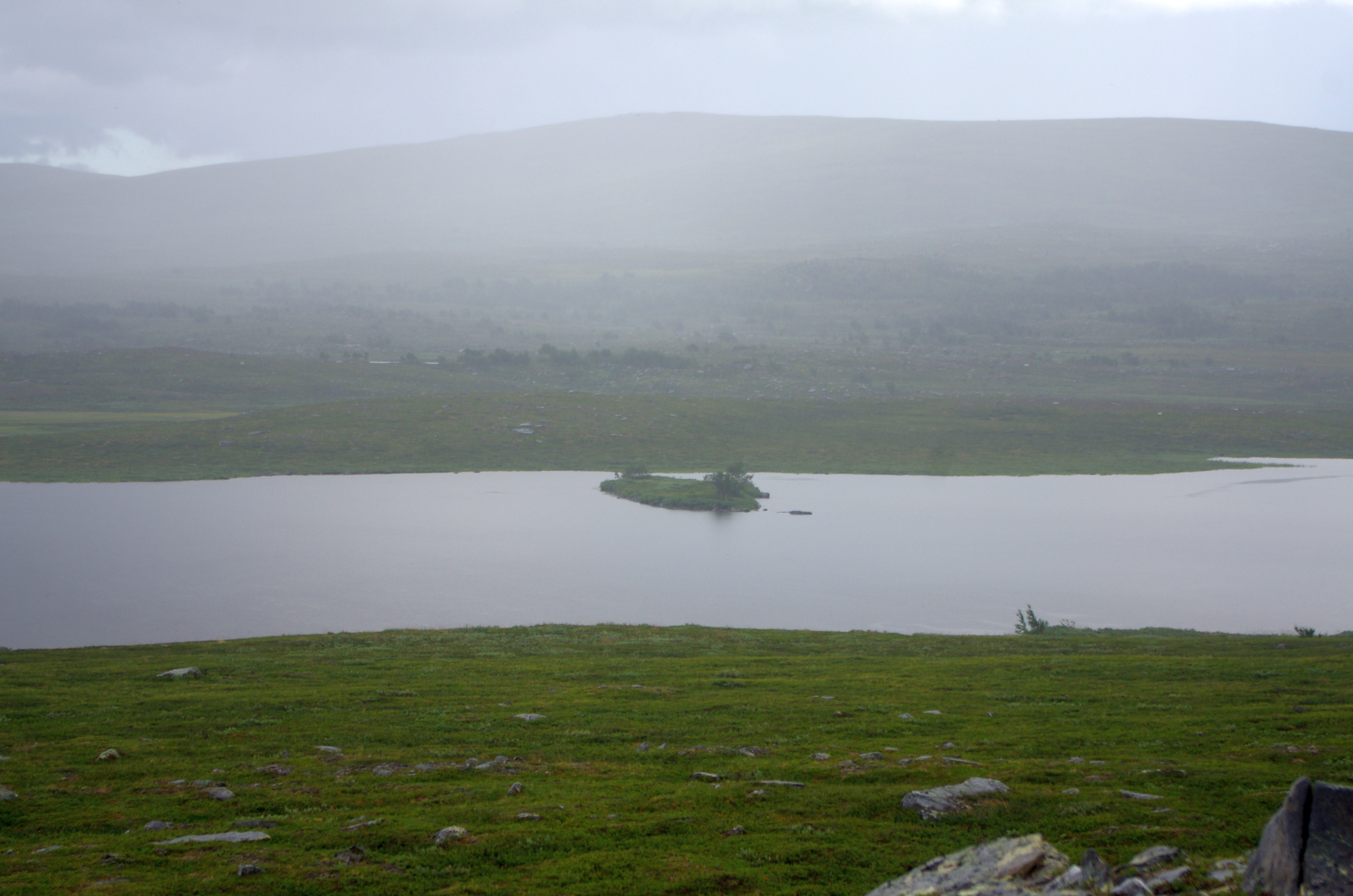 Stikojaure (Stijguojárrie)en sjö i Arjeplogs kommun i Lappland i Sverige.